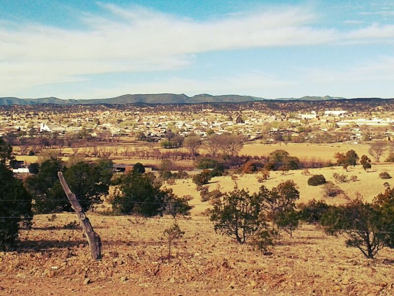 Carichi invierno de 2012